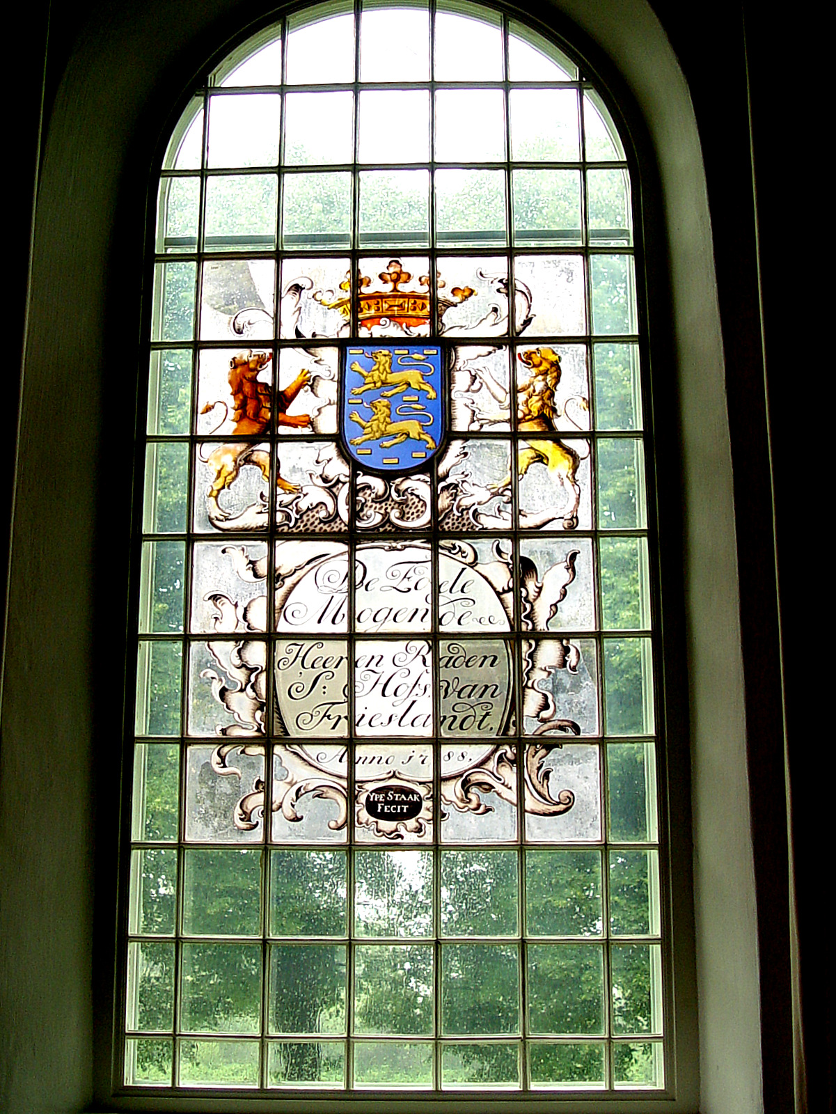 Raam van Ype Staak in Hervormde kerk van Scherpenzeel Friesland